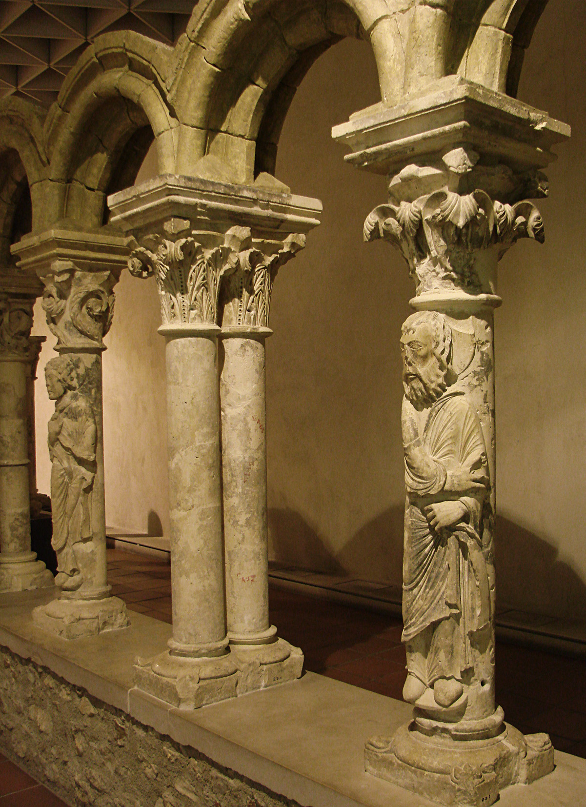 Cloître de Notre-Dame-en-Vaux, 12ème siècle. Ce cloître roman, détruit au 18ème siècle, a été en partie reconstitué à partir des fragments retrouvés. Musée du cloître de Notre-Dame-en-Vaux, Châlons en Champagne (51), France.